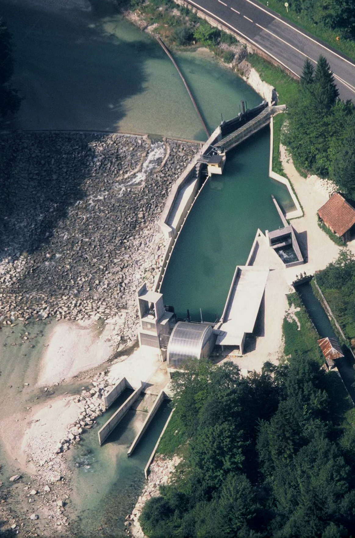 Kleinkraftwerk Hangendenstein, Grödig